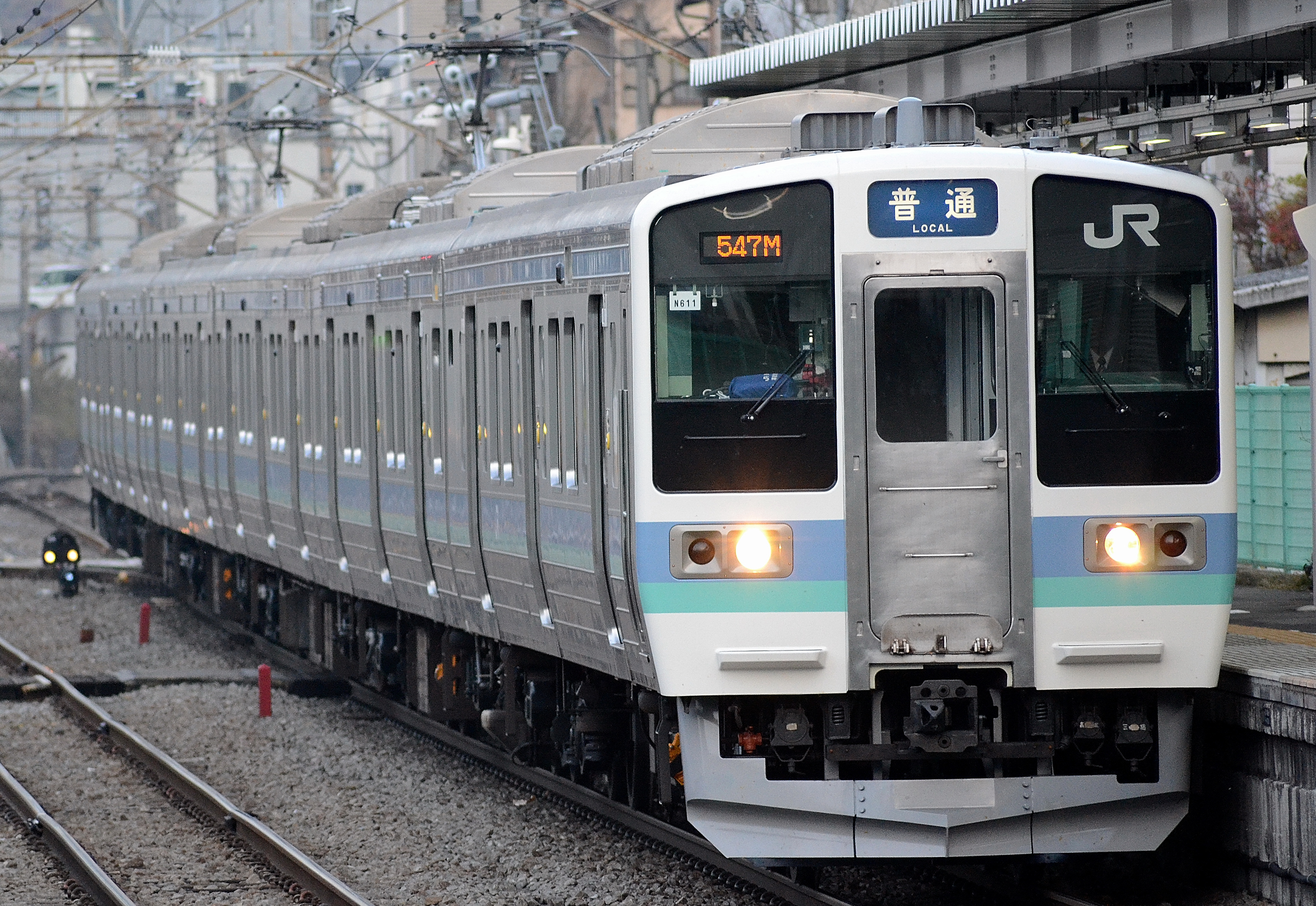 大月駅に進入する、長野総合車両センターのN611編成